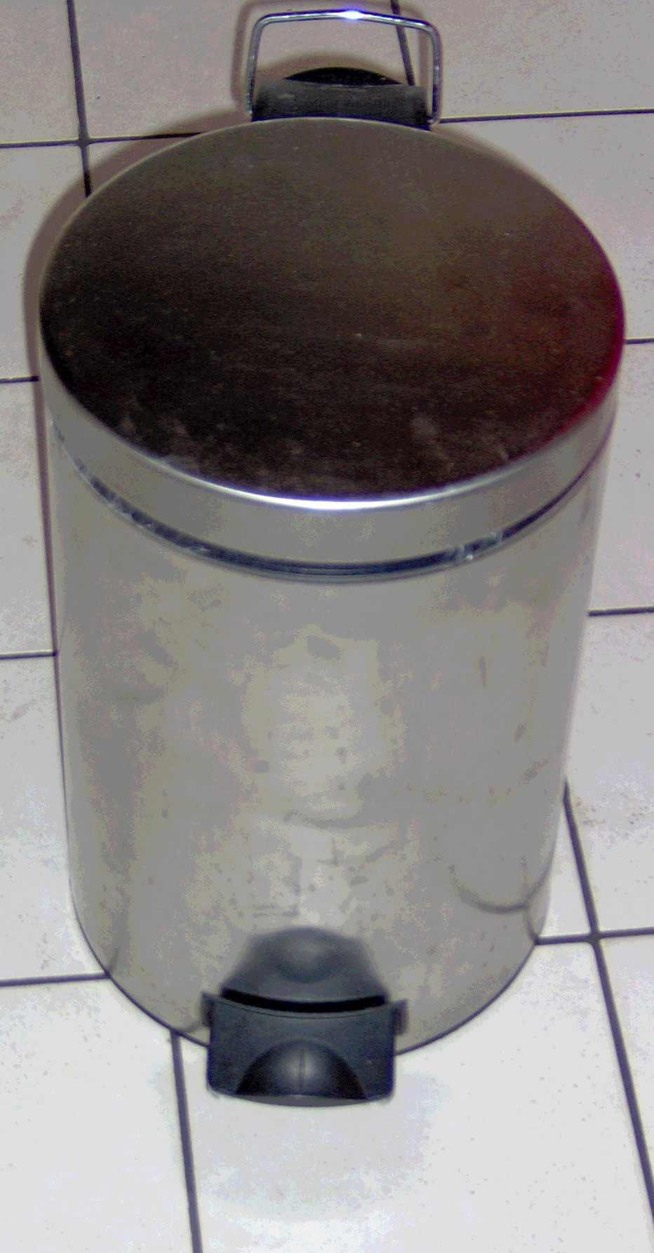 Pedaalemmer, zelfgemaakt.